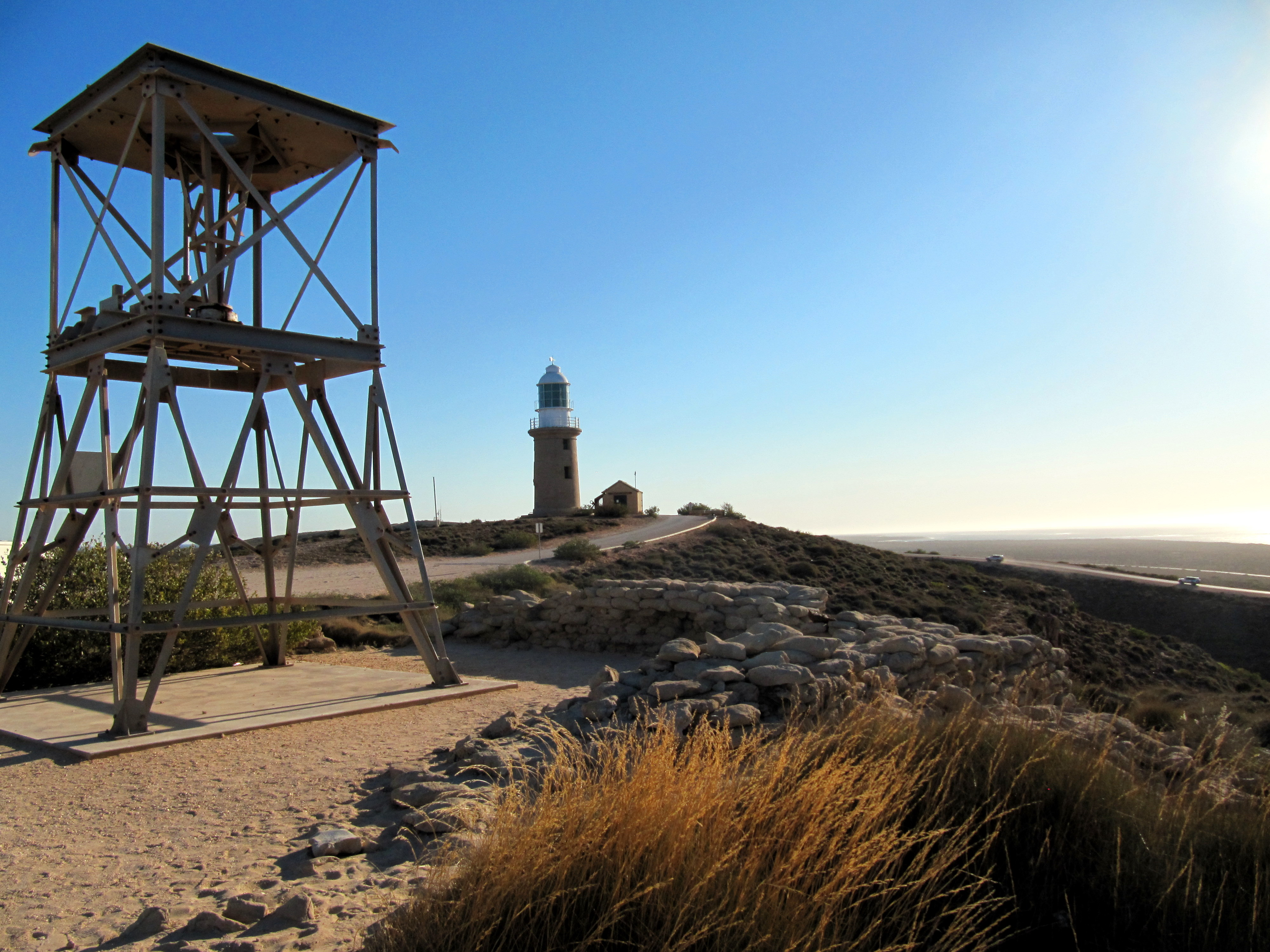 The Lighthouse Exmouth WA